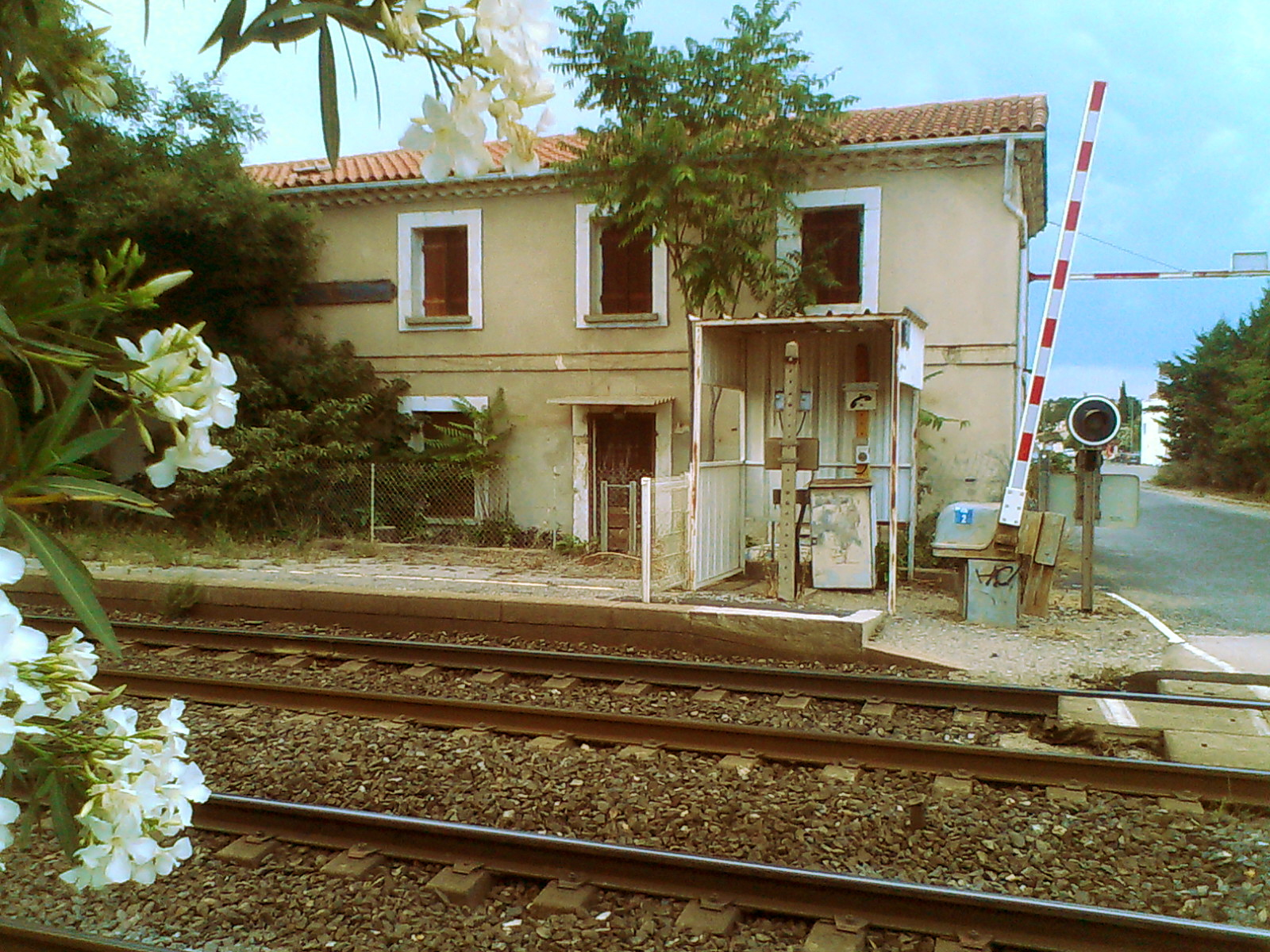 La gare SNCF des Mazes à Le Crès 34920 France